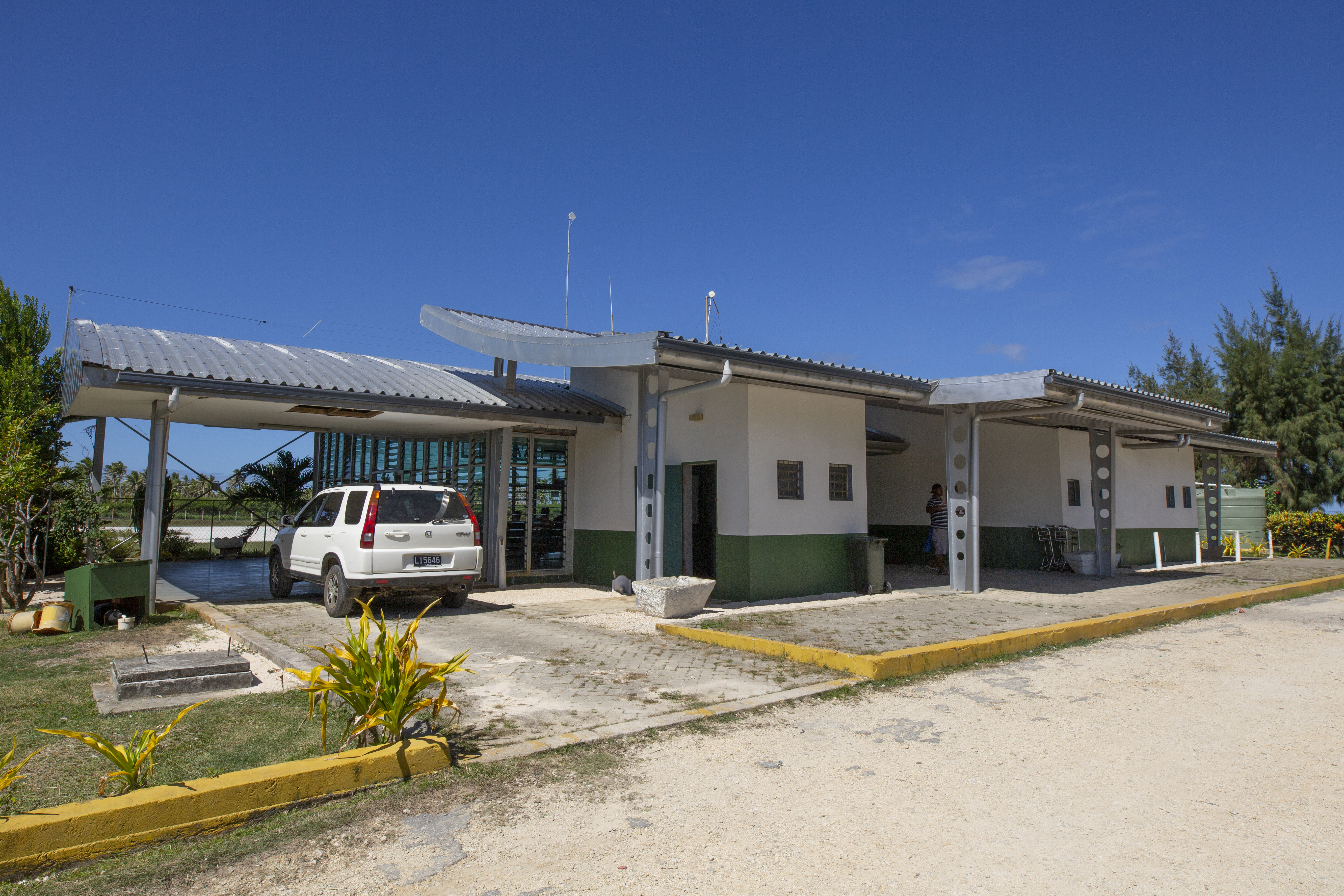 Salote Pilolevu Airport